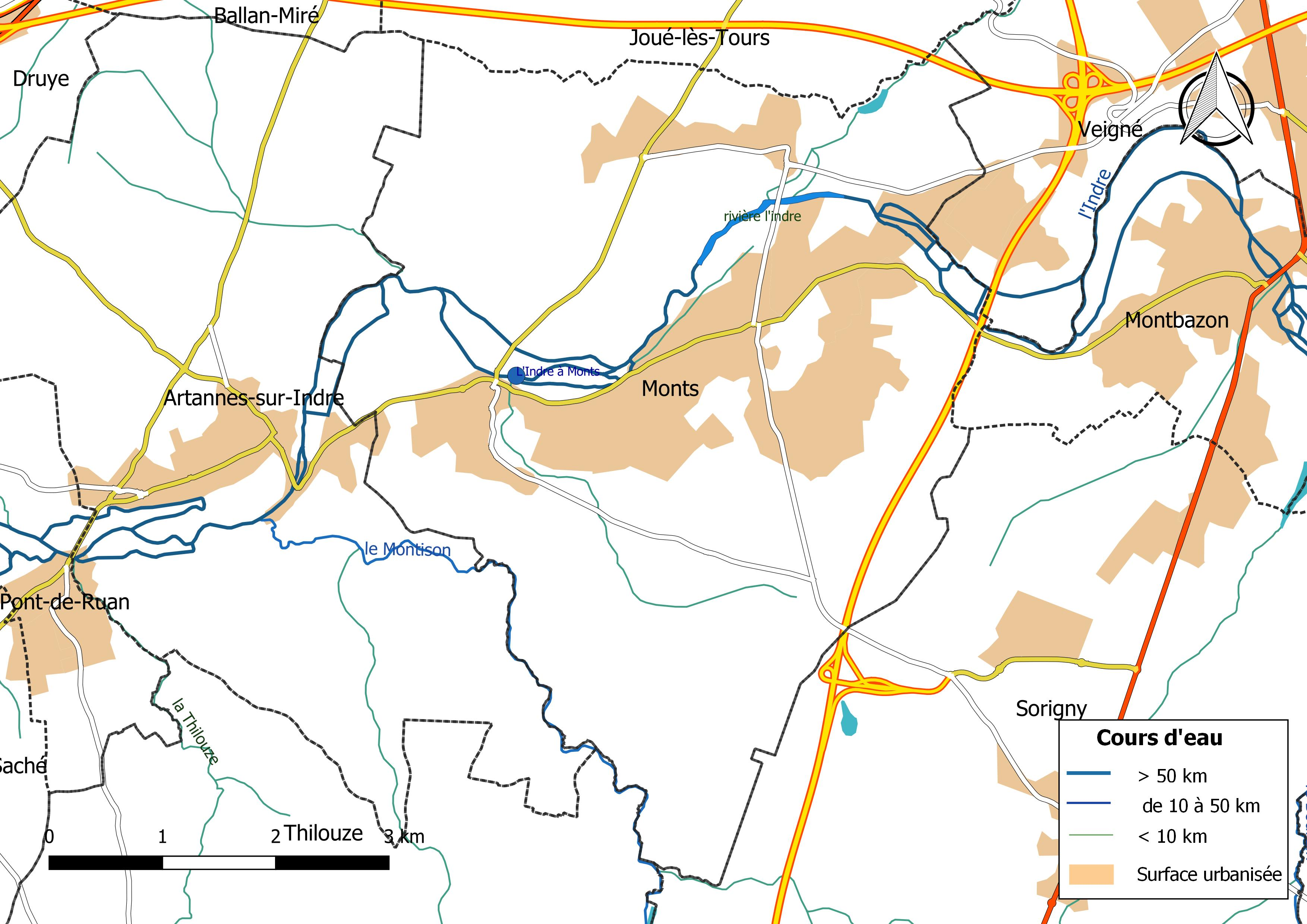 Carte du réseau hydrographique de la commune de Monts (Indre-et-Loire) (France).